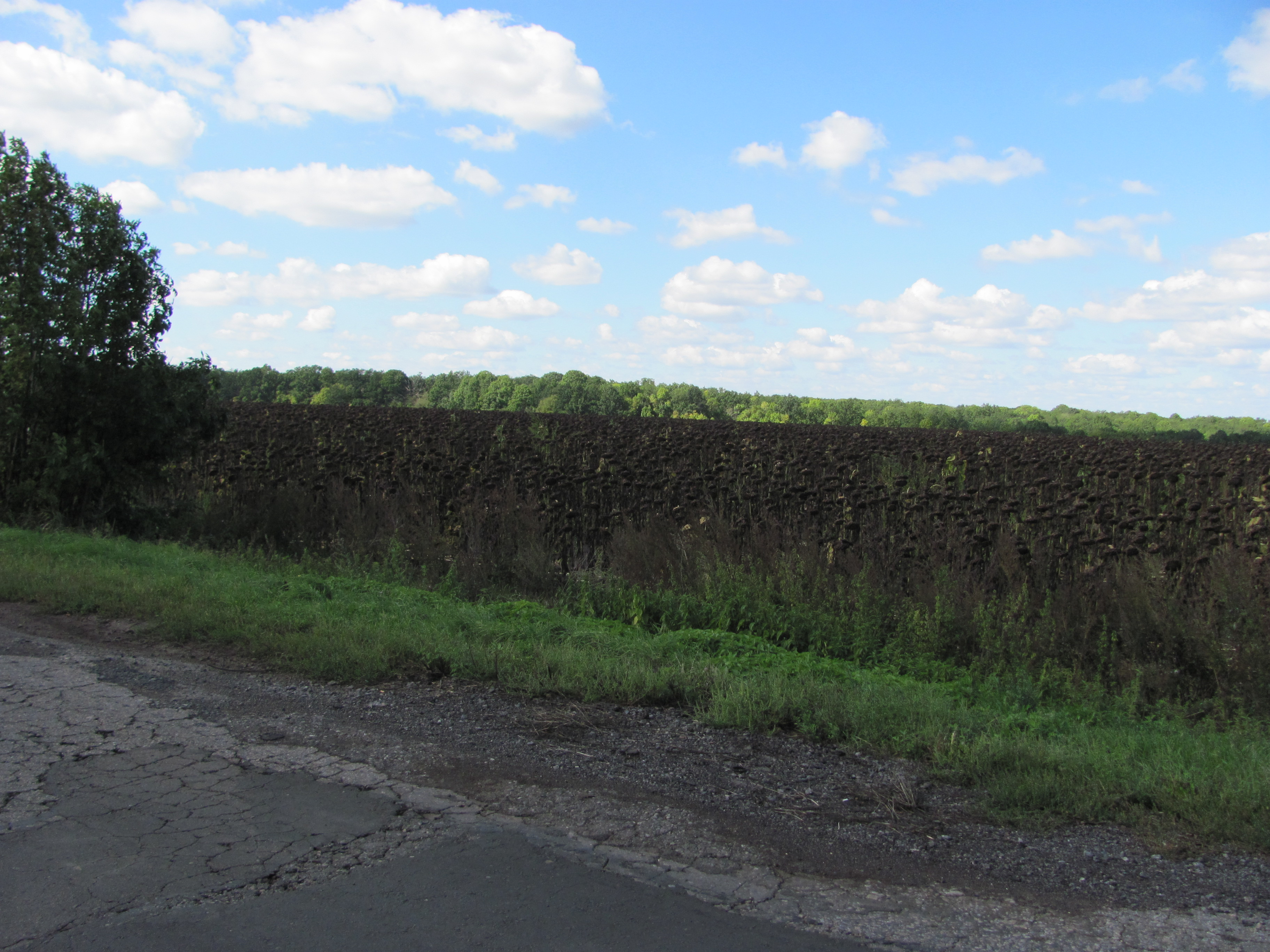 городище